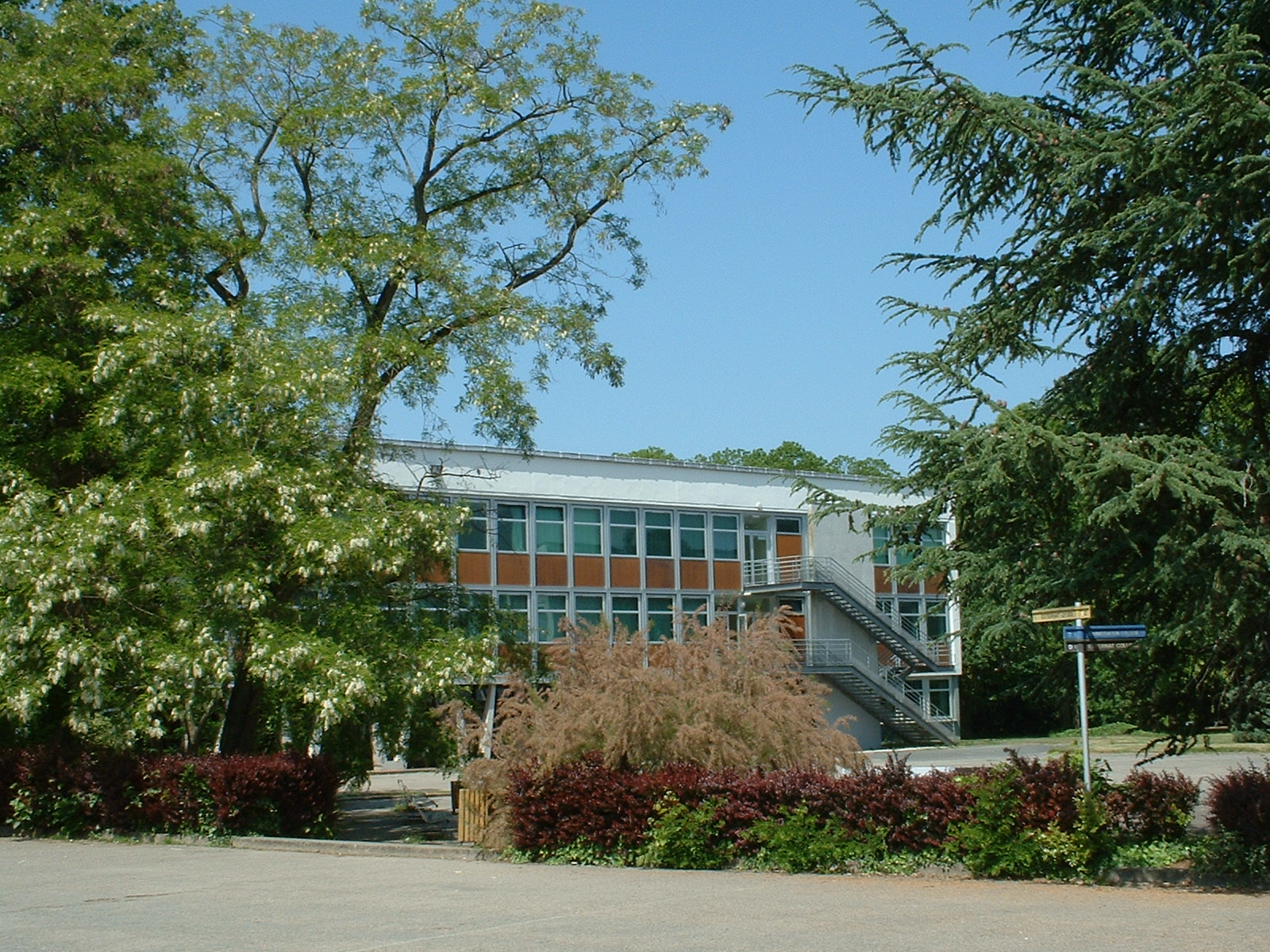 Nantes (France) - Lycée la Colinière